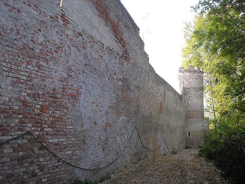 Landsberg am Lech (Oberbayern). Nordwestlicher Mauerzug der Stadtbefestigung. Eigene Aufnahme, Okt. 2006 / Landsberg am Lech (Upper Bavaria, Germany). City wall, looking northwest. Own photo, Oct. 2006